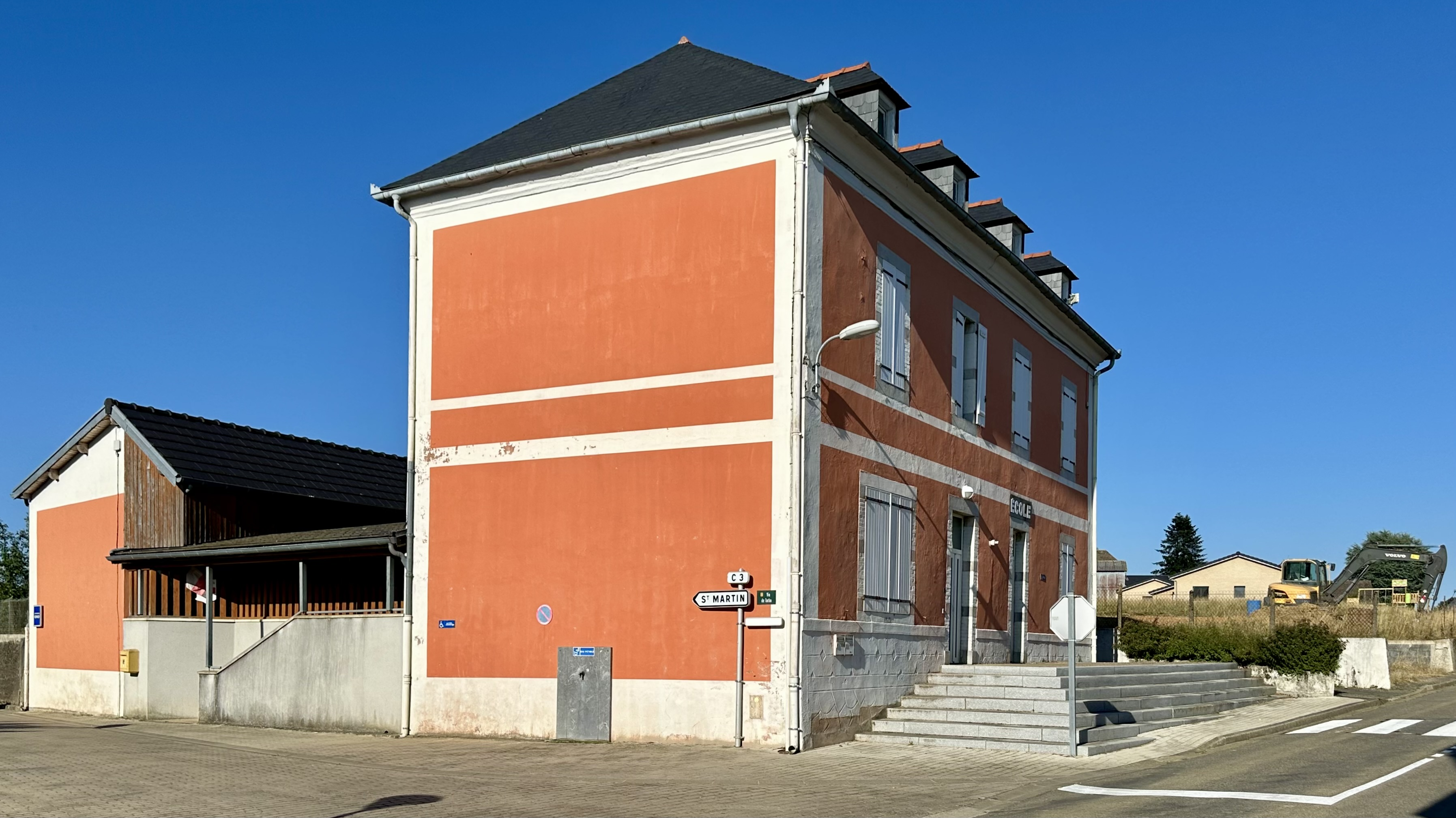 École de Visker (Hautes-Pyrénées, France)